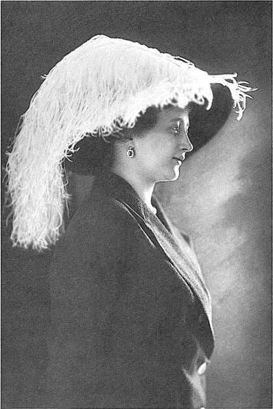 Countess Isabella Esterházy de Galánta.